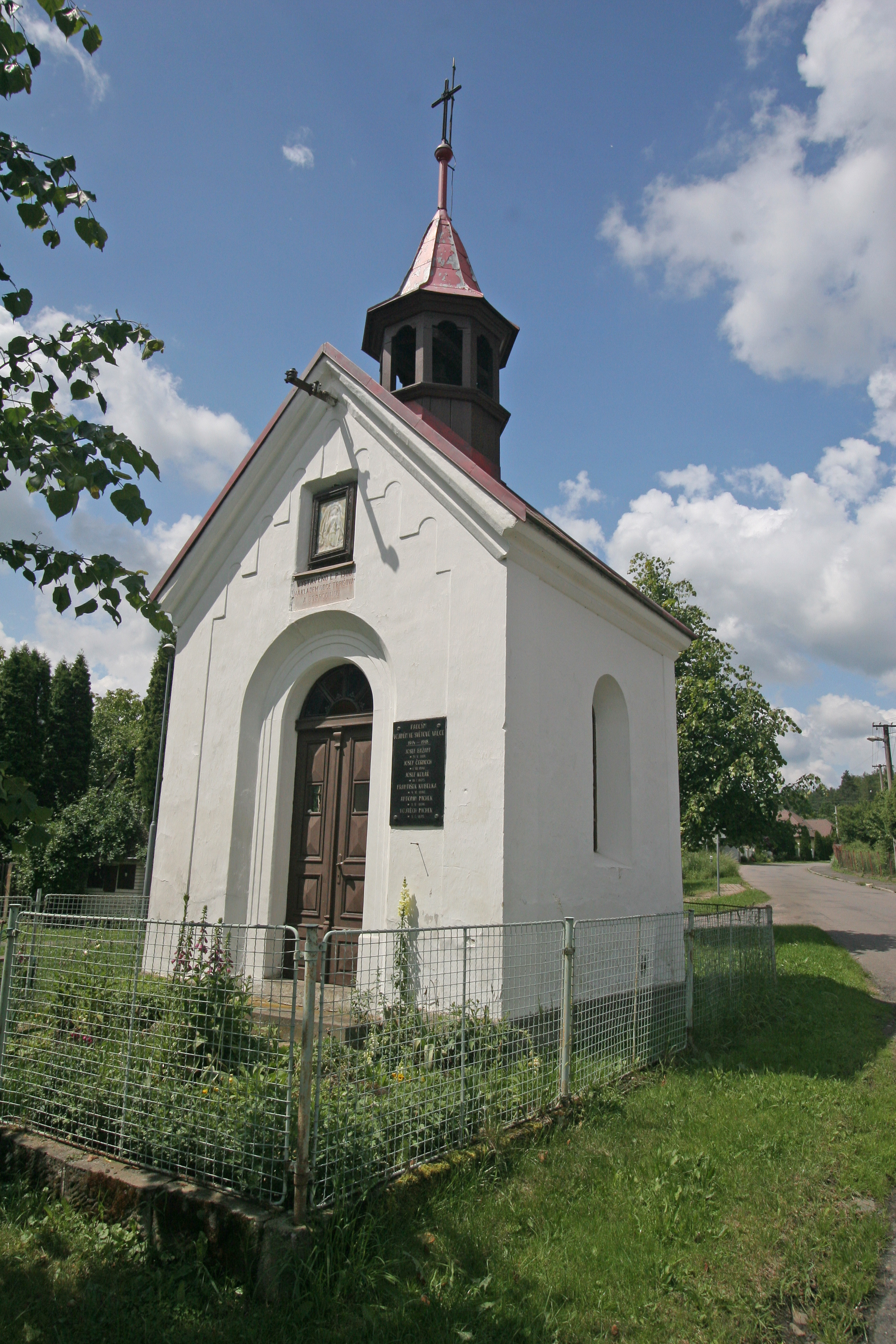 Trpišov - kaplička